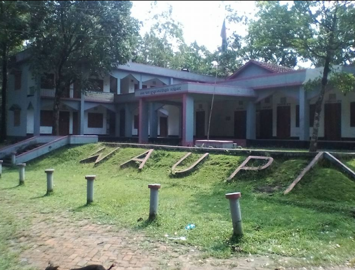 পশ্চিম আমুড়া ইউনিয়ন